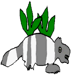 Glifo o escudo del municipio de Epazoyucan